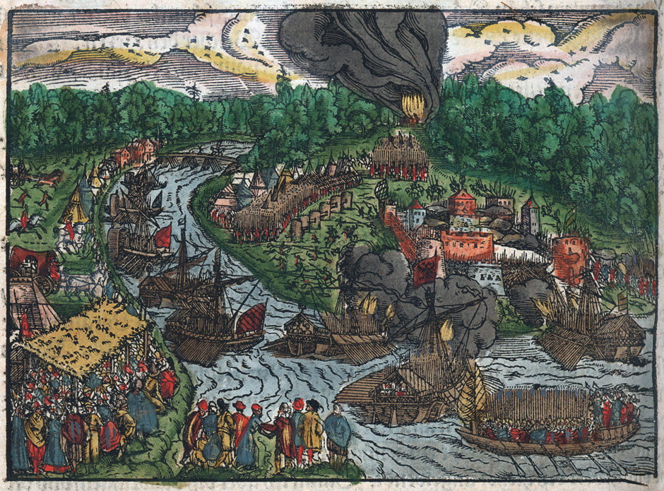 Colorized woodcut from: (Rüxner, Georg). Thurnierbuch, das ist, Warhaffte, eigentliche, vnd kurtze Beschreibung von Anfang, Vrsachen, Vrsprung, vnd Herkommen der Thurnier im Heyligen Romischen Reich Teutscher Nation, wie viel offentlicher Landthurnier von Keyser Heinrichen dem Ersten dieses Namens an biss auff Keyser Maximilian den Andern ... vnd in welchen Statten die alle gehalten, auch durch welche Fursten, Graffen, Herrn, Ritter, vnd vom Adel dieselben jeder Zeit besucht worden, Frankfurt am Main, Reffeler für Feyerabend, 1578-79